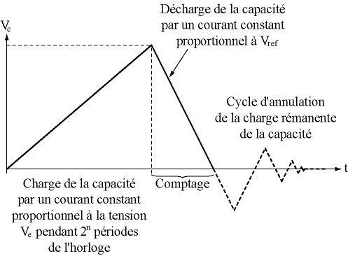 auteur : haarkon image originale non publiée